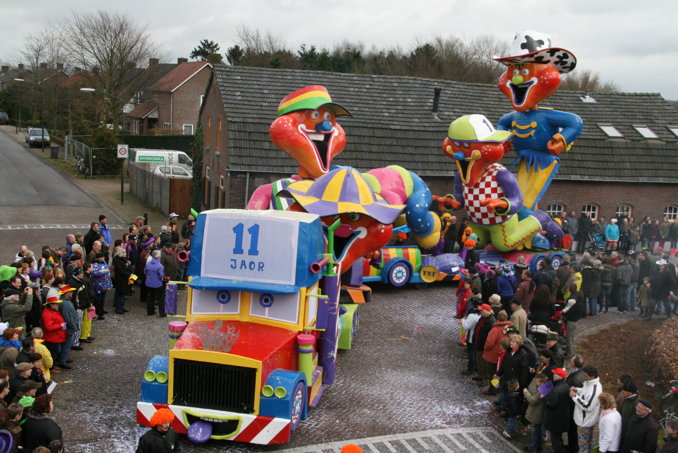 Carnavalswagen bouwstijl regio Noord-Brabant (Soerendonk)